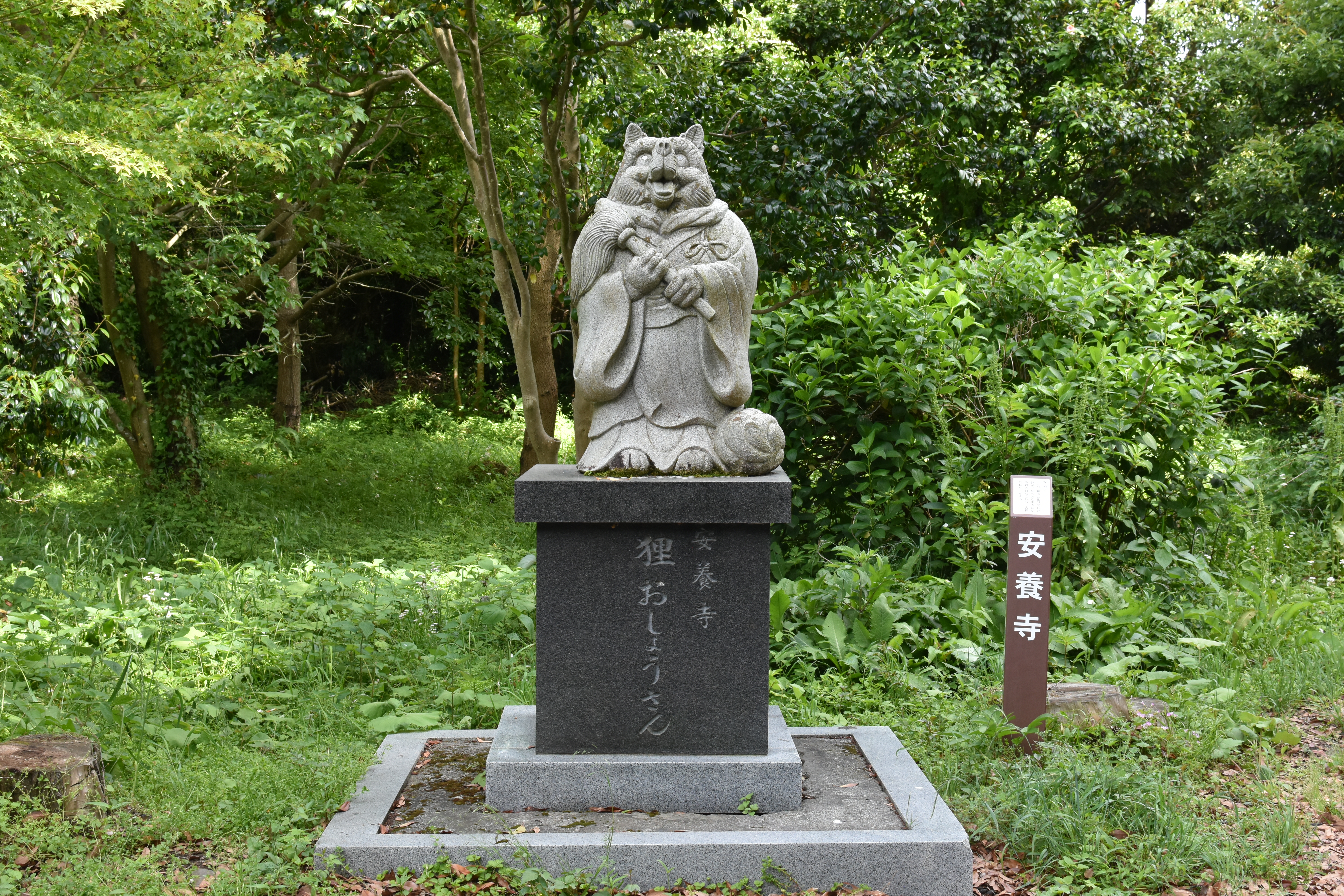 狸和尚の石像、2020年5月23日撮影。